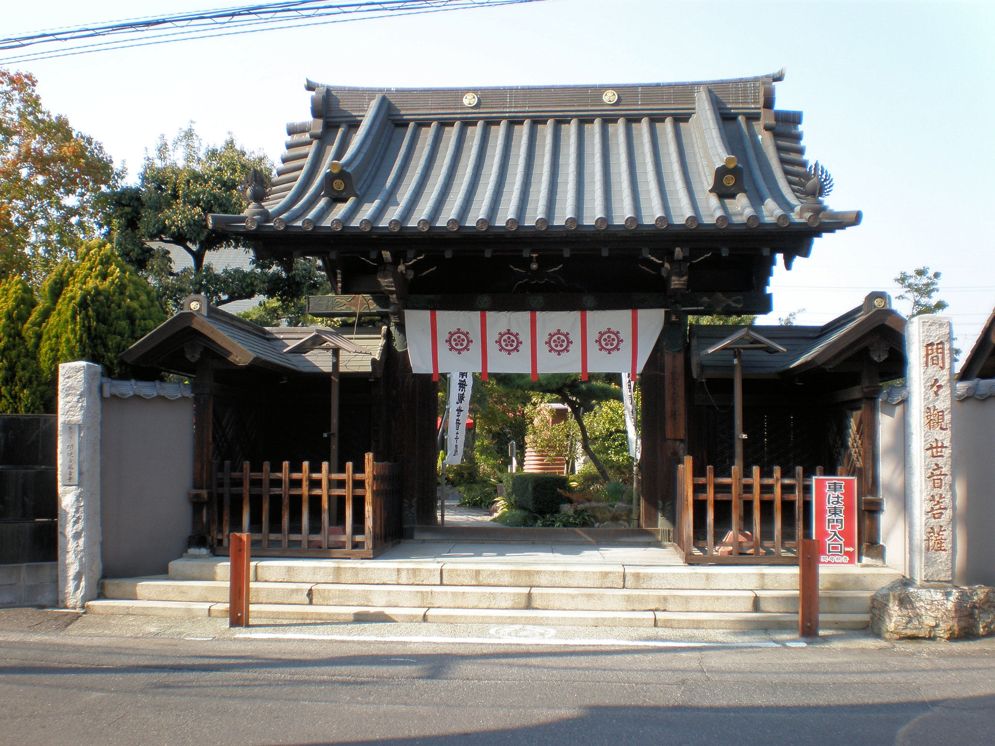 愛知県小牧市にある間々観音